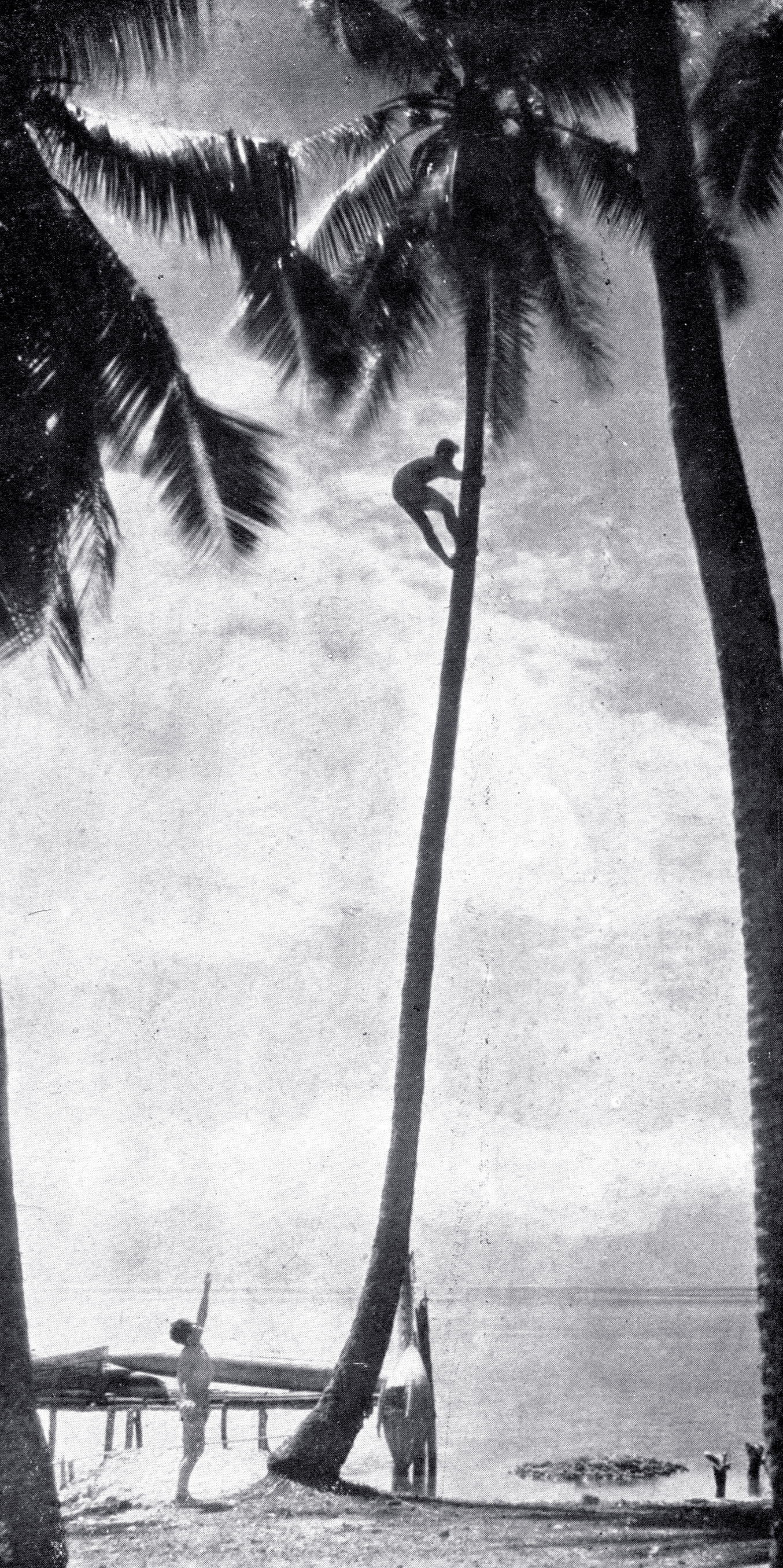 scena del film L'isola del sole (The pagan) diretto da W. S. Van Dyke - 1929